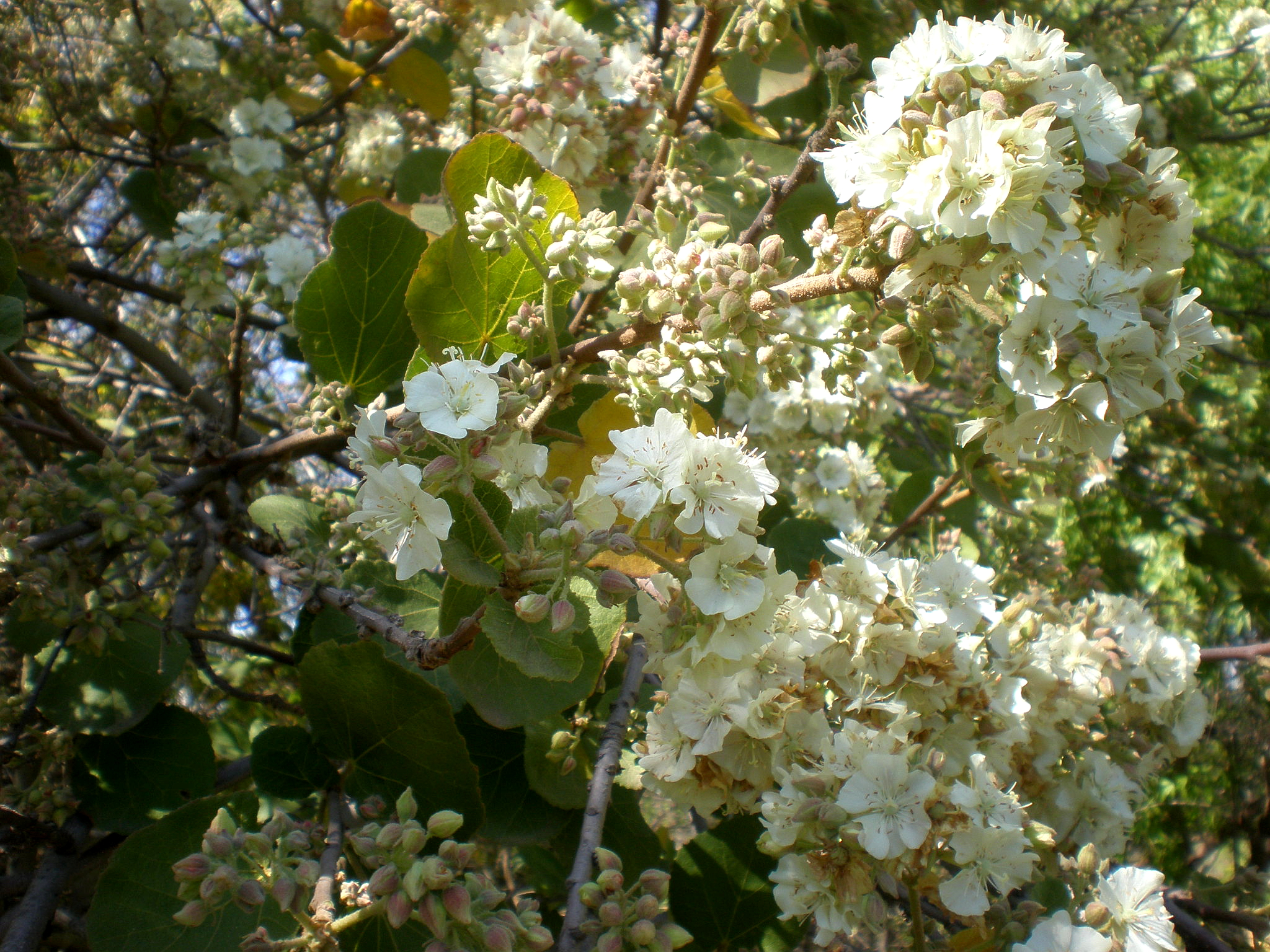 Jardín Botánico de Barcelona.